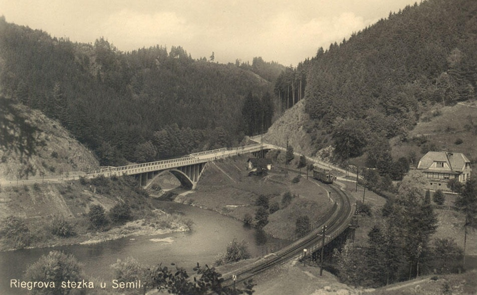 Silniční mosty přes řeku Kamenici a přes železniční trať v Podspálově.